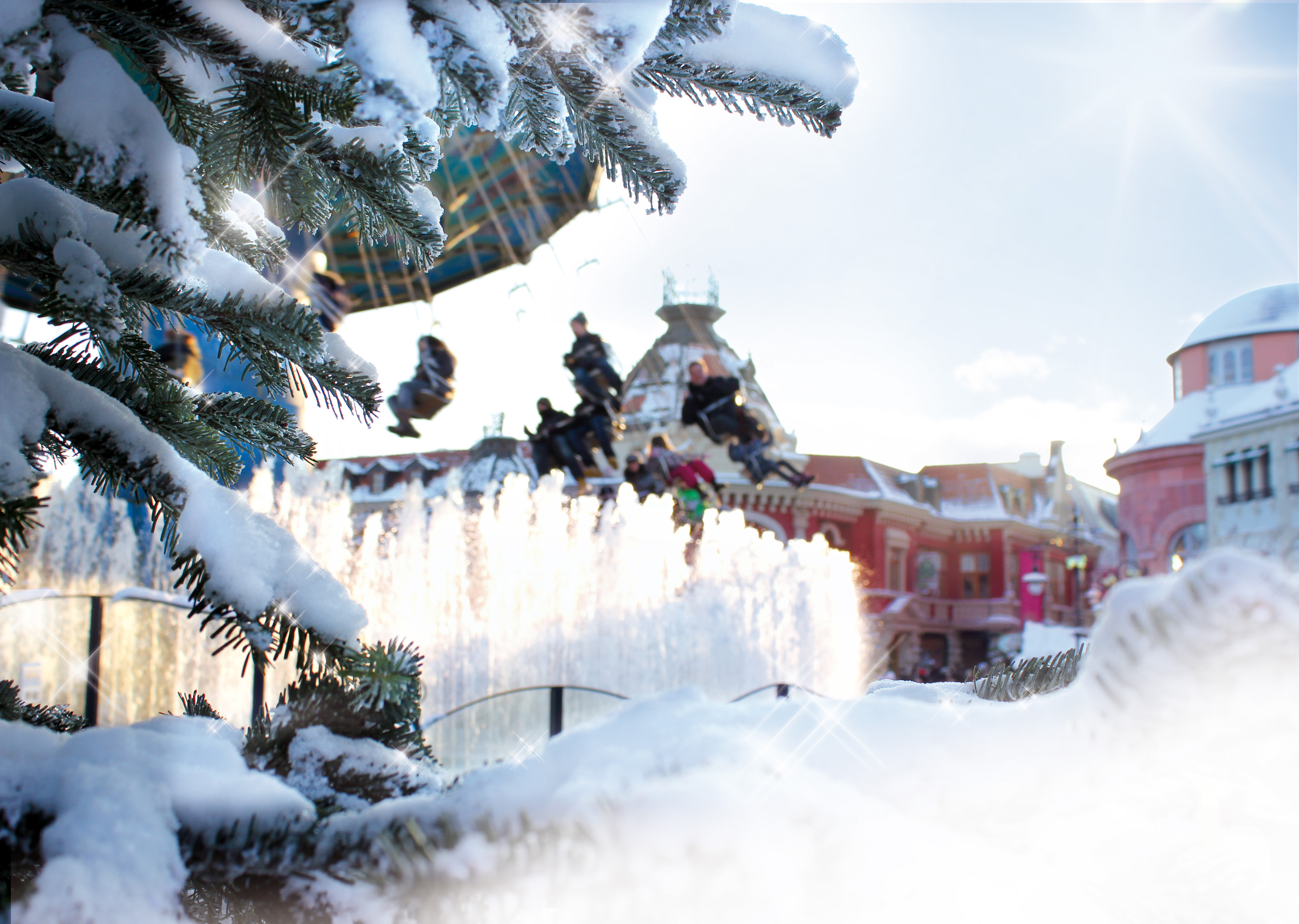 Kettenkarussell